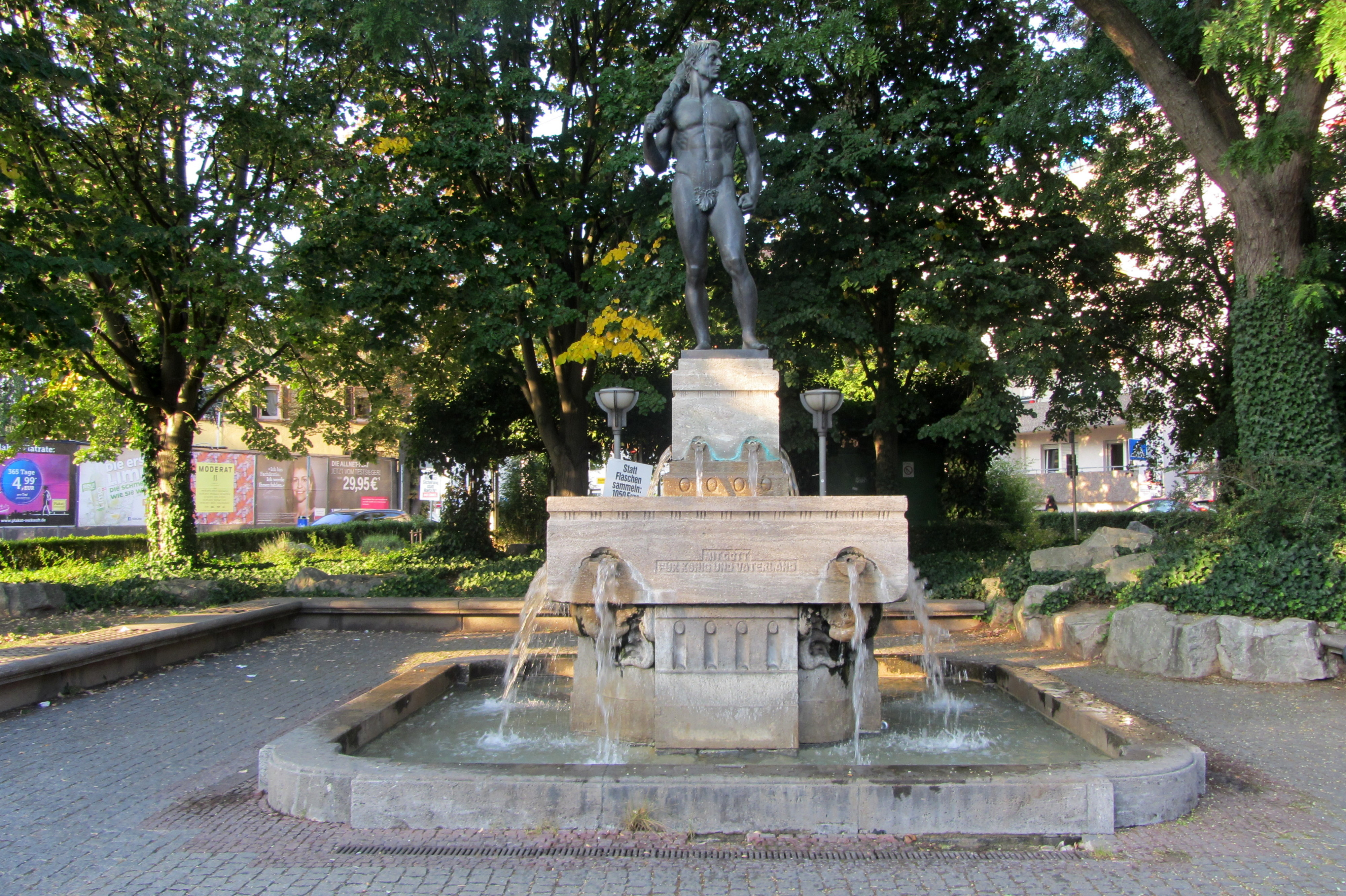 Der Weißer Stein Brunnen in Frankfurt Eschersheim